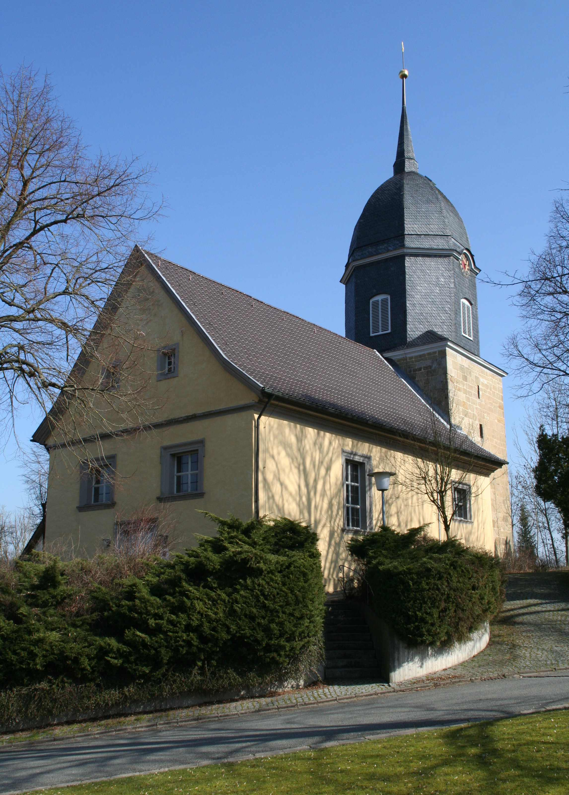 evangelische Marienkirche in Breitenau, Gemeinde Bad-Rodach, Landkreis Coburg